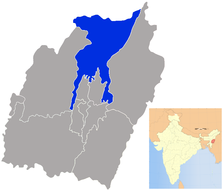 Senapati district in Manipur